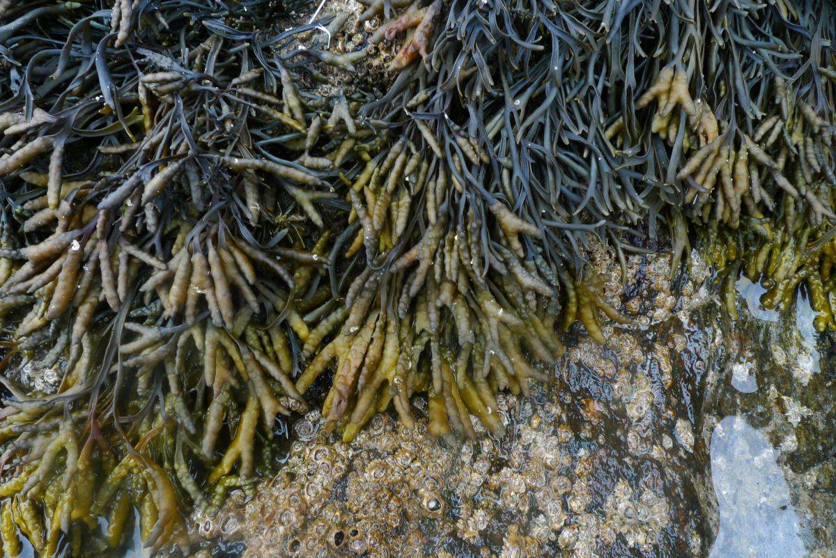 Pelvetia canaliculata, Belle-Île (Le Palais, Morbihan, bretagne, France)